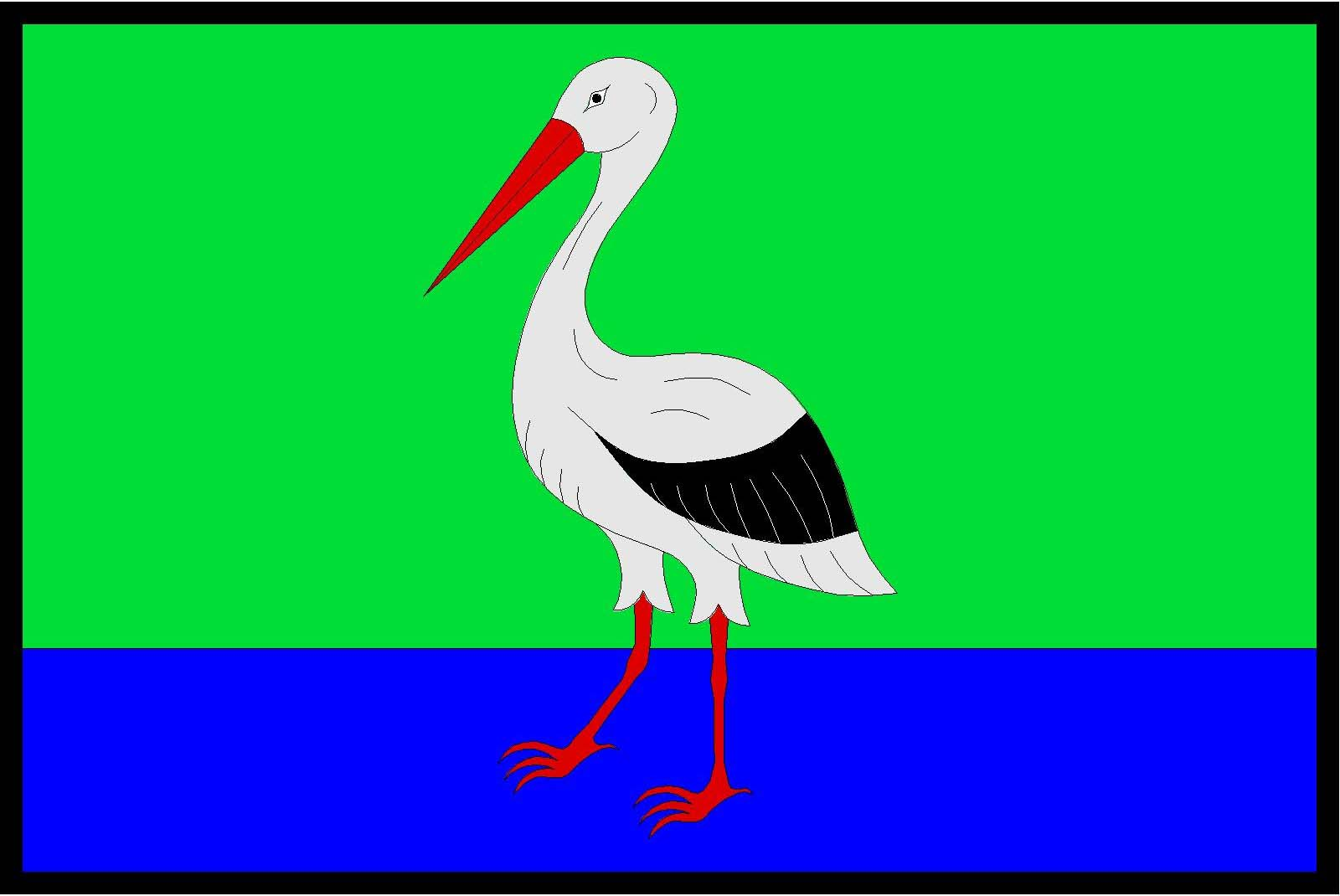 Vlajka obce Šestajovice (okres Náchod)